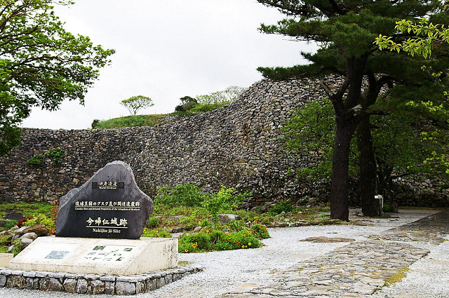 今帰仁城 入口（沖縄県今帰仁村) Nakijingusuku（Okinawa, JAPAN）